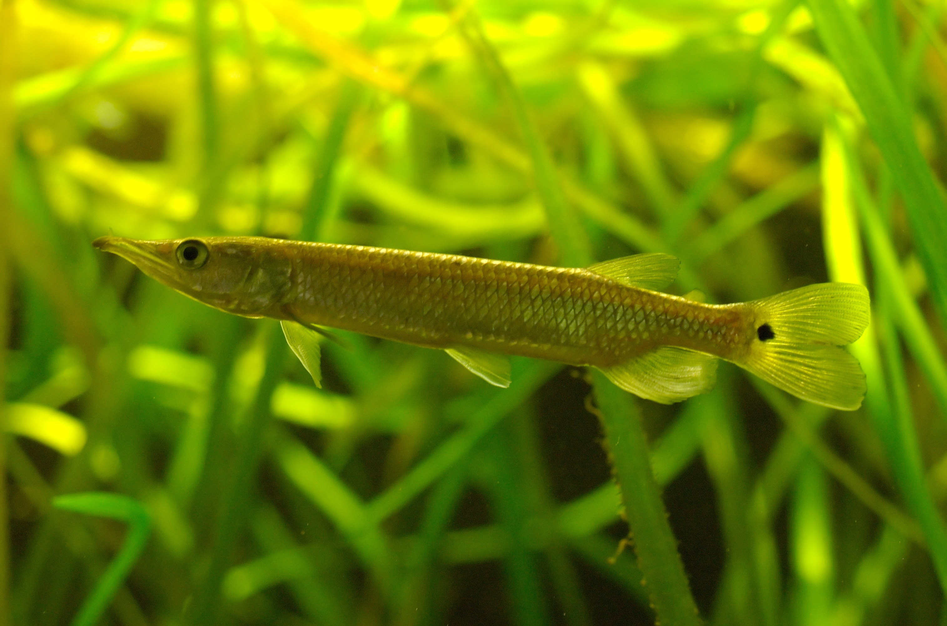 Ctenolucius hujeta, Zoo Leipzig